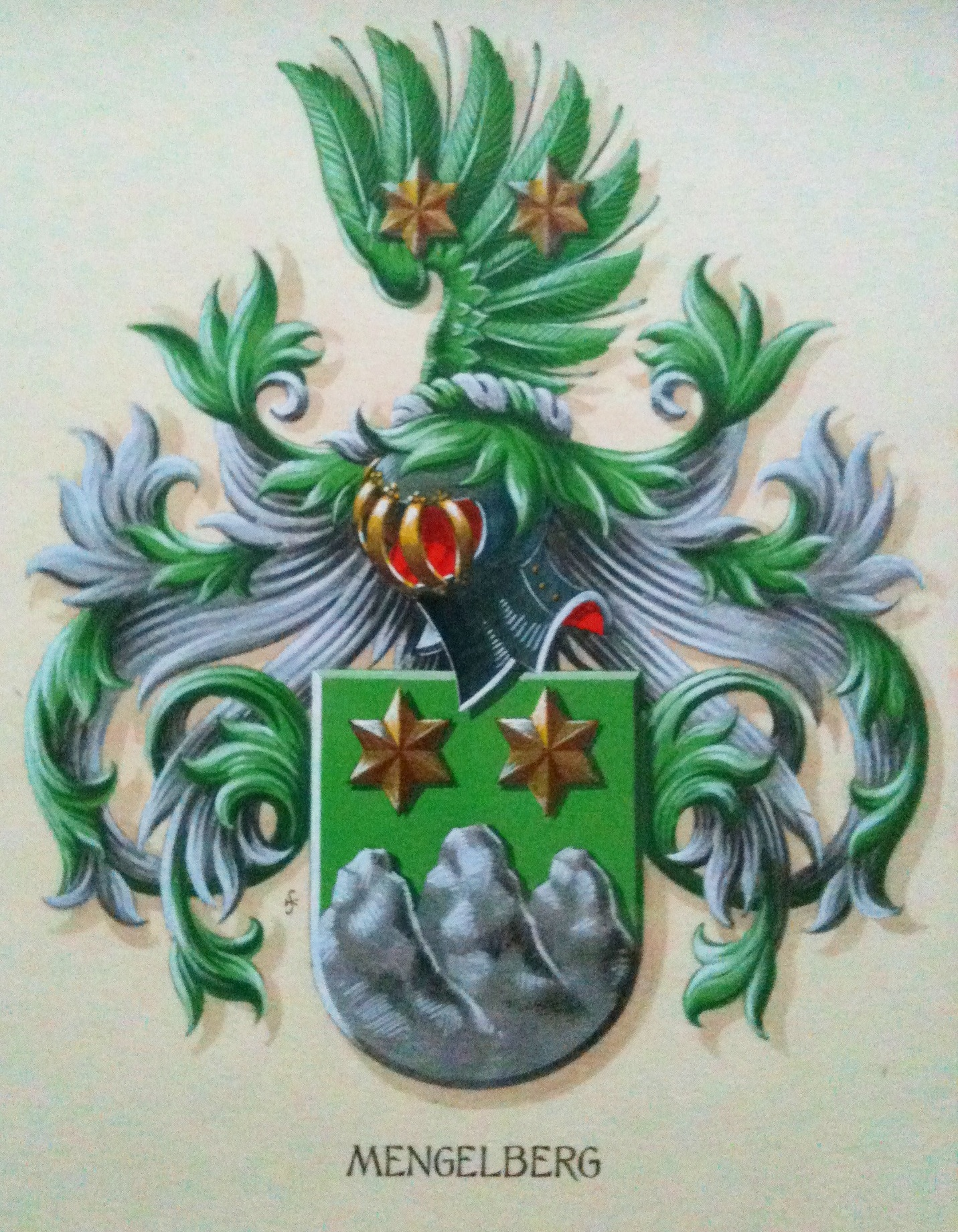 Wapen familie Mengelberg / Coat of Arms / Waffen